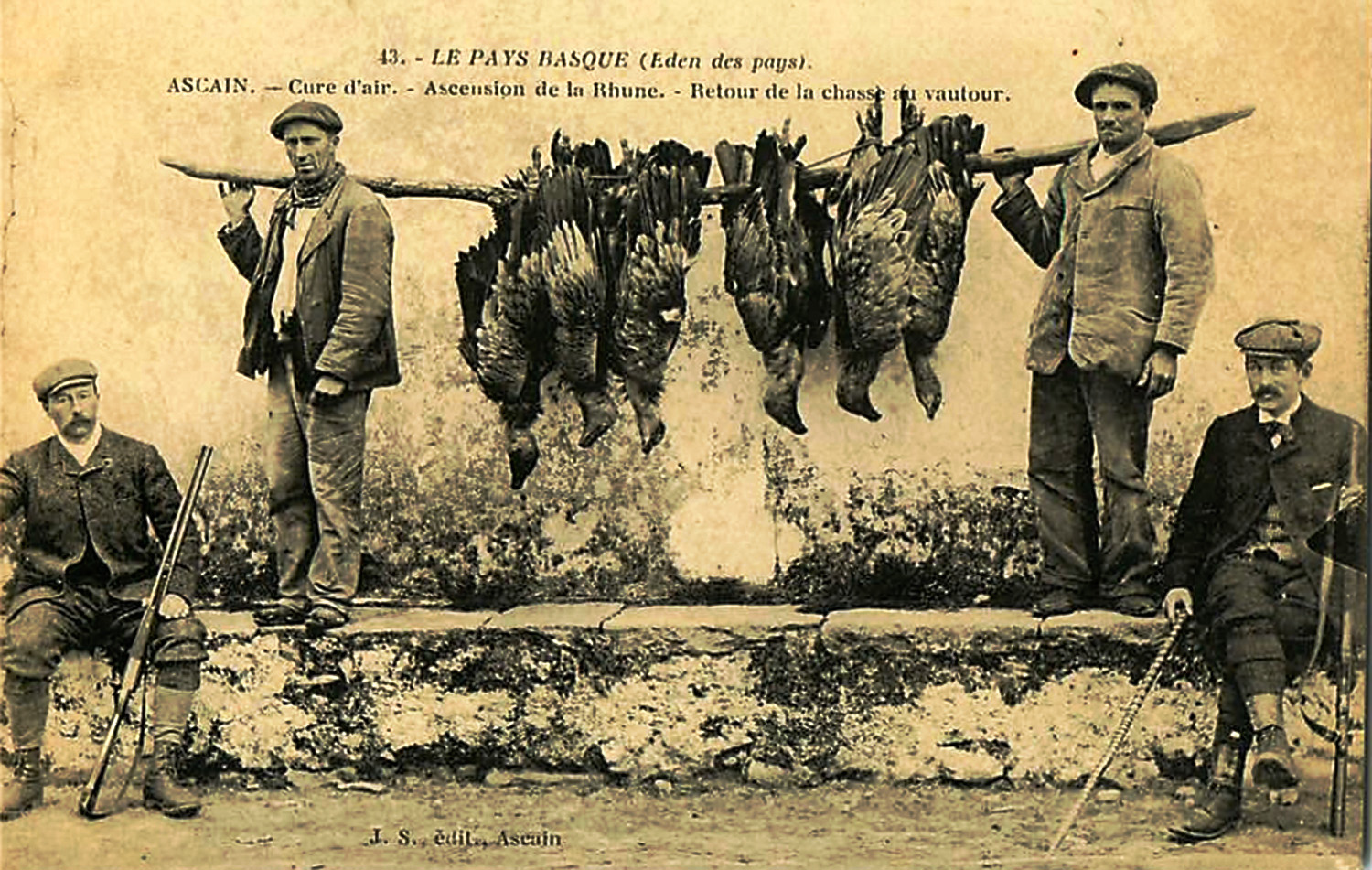 Retour de la chasse aux vautours